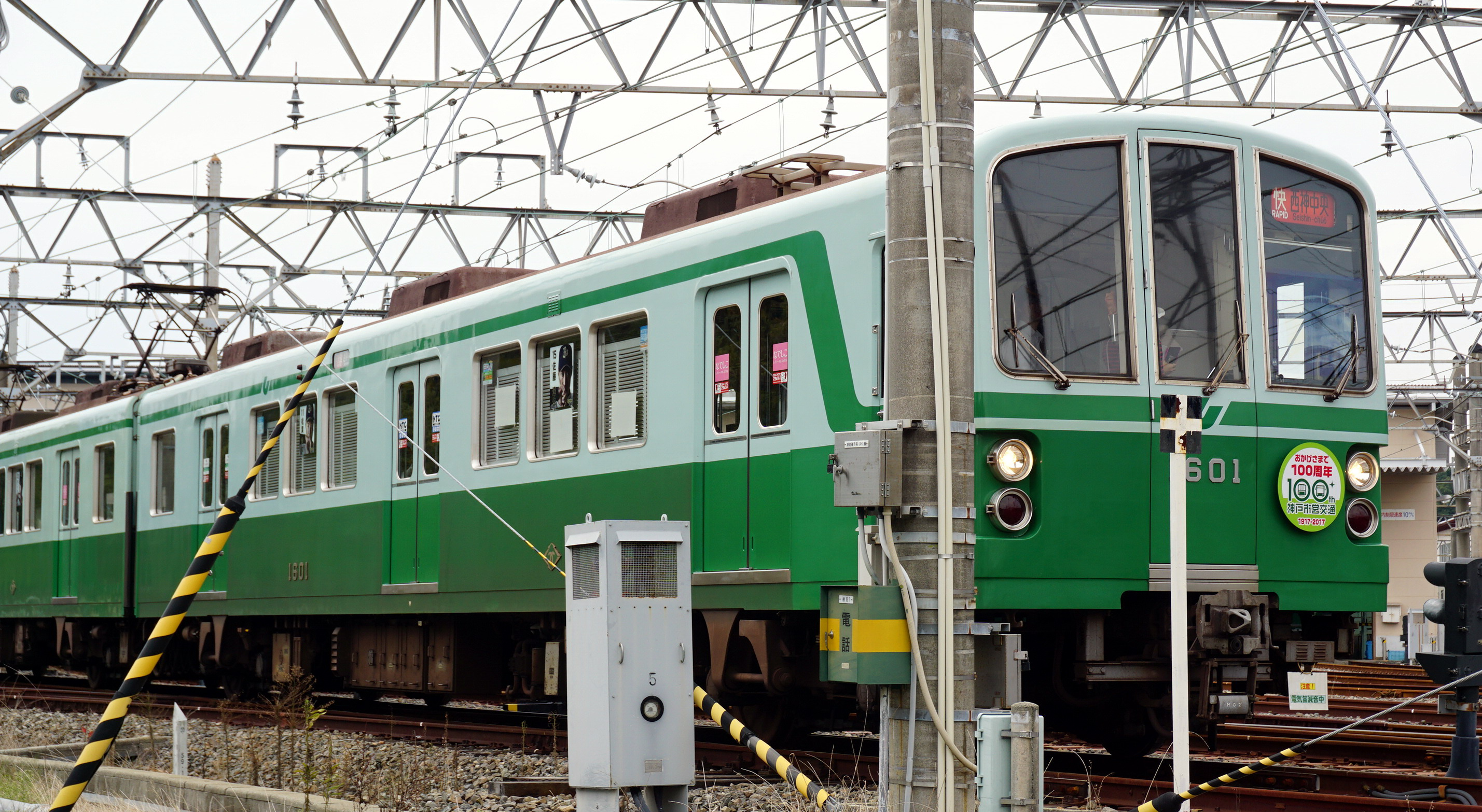 今も残る快速幕（名谷車両基地のイベントにて撮影）